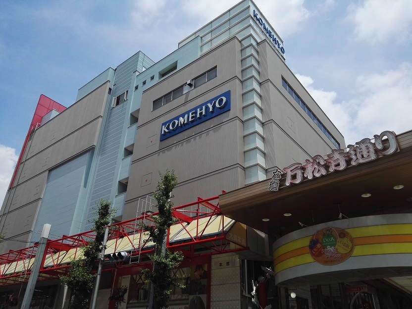 Komehyo building, Osu, Nagoya